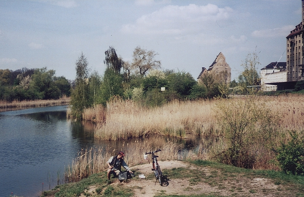 Landzunge am Hafenbecken, Lindenauer Hafen in Leipzig